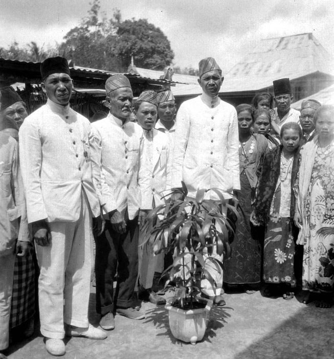 Negatief. Dorpshoofden te Tjoeroep, Benkoelen, Zuid-Sumatra